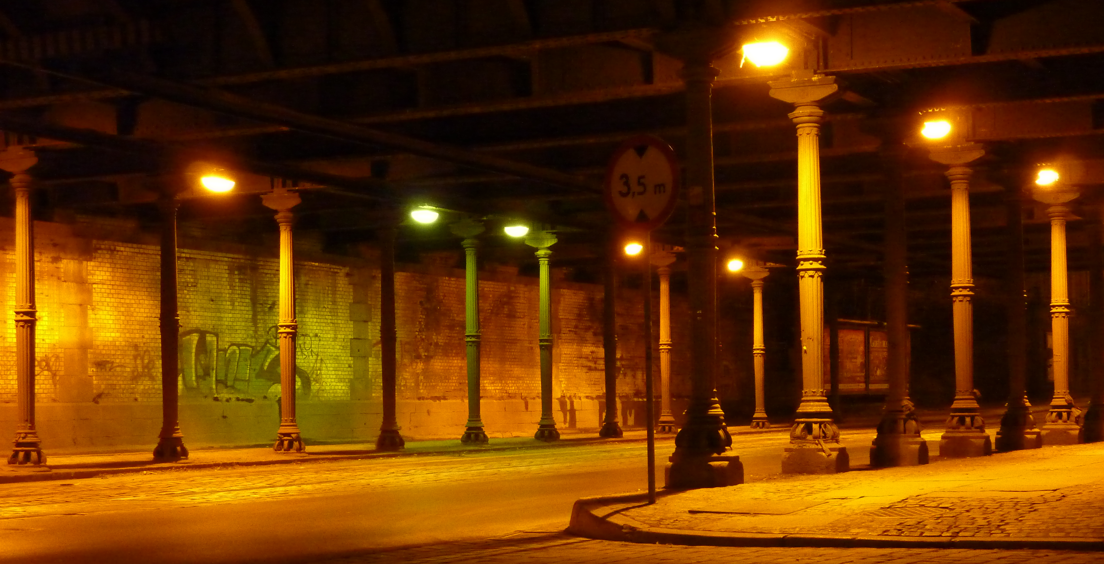 Wiadukt kolejowy z filarami Hartunga we Wrocławiu nad ciągiem ulic Stawowej i Borowskiej.